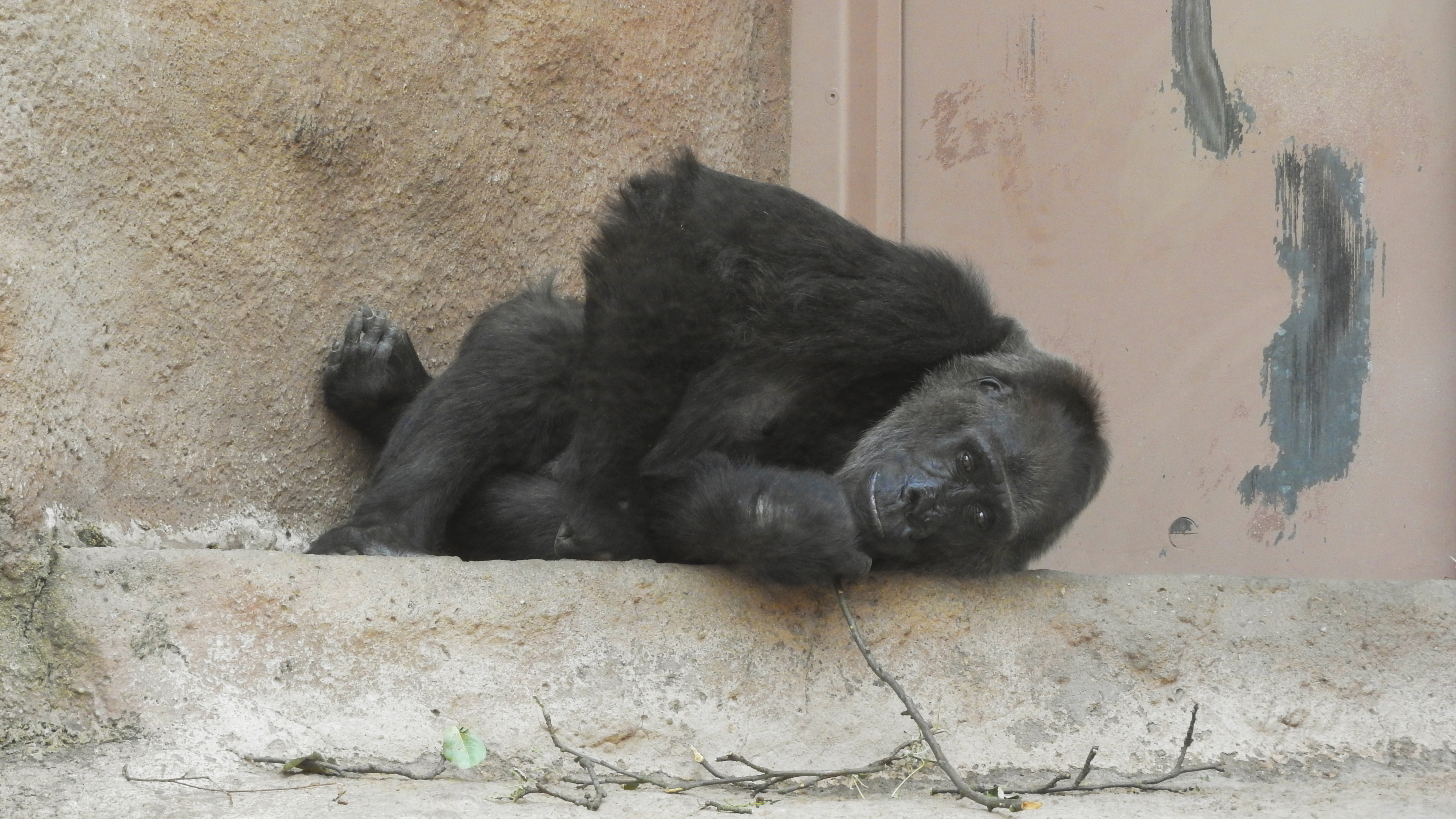 Pravděpodobně Kamba, nejstarší samice gorilí tlupy v pražské zoo, léto 2018